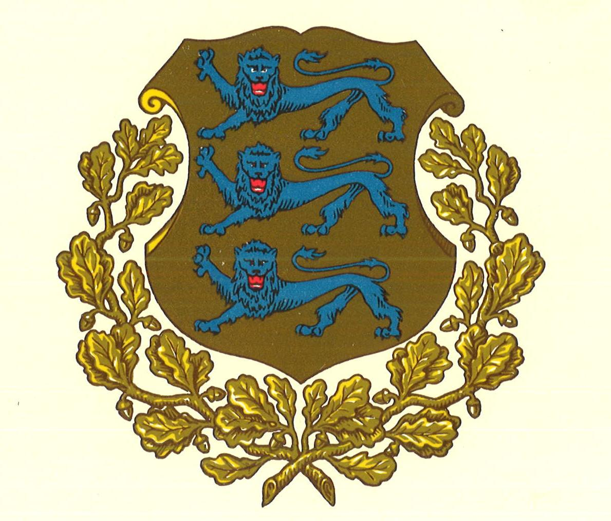 Aastail 1925–1940 ja eksiilis kasutatud suur riigivapp